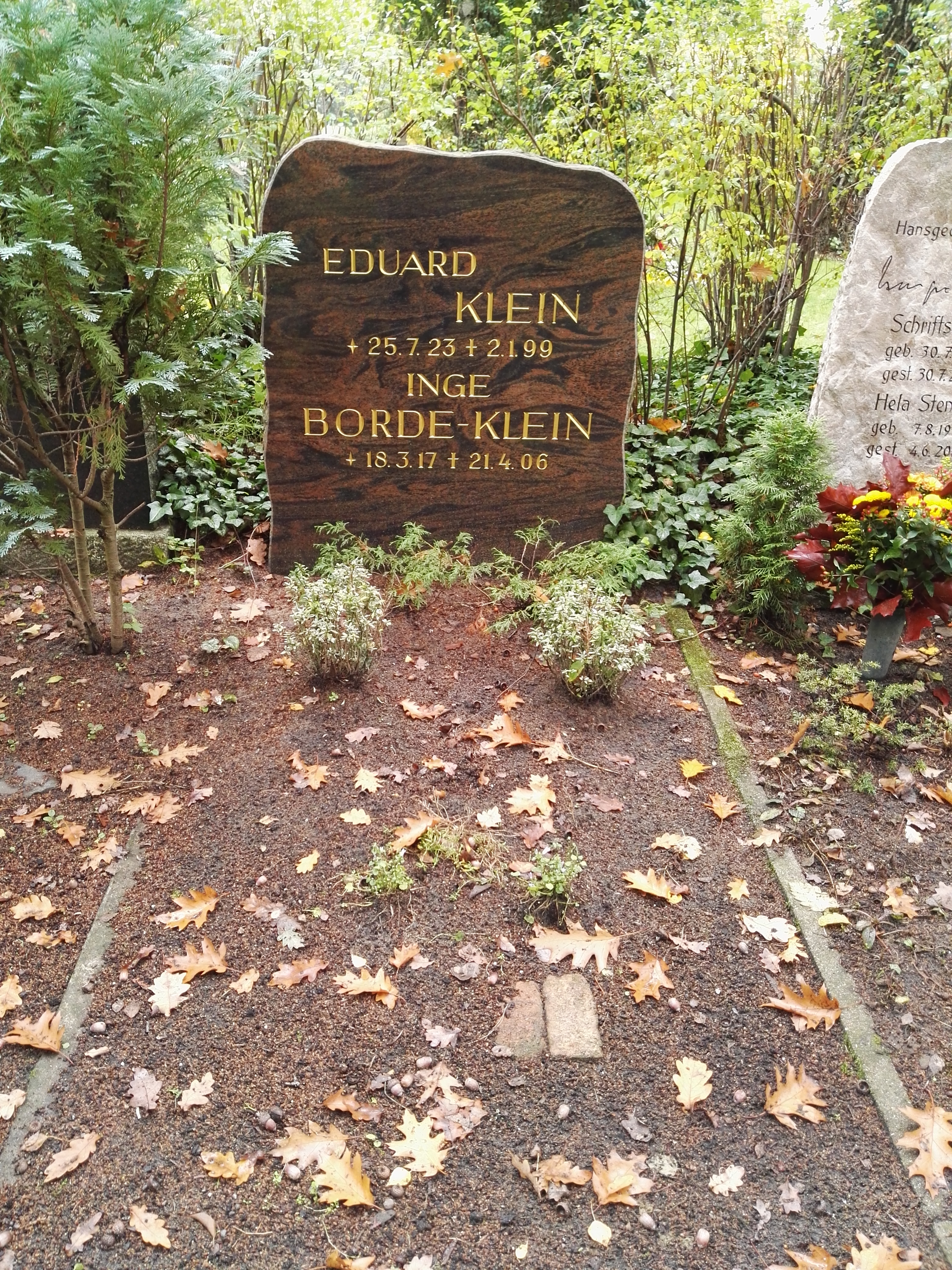 Grab von Eduard Klein auf dem Zentralfriedhof Friedrichsfelde